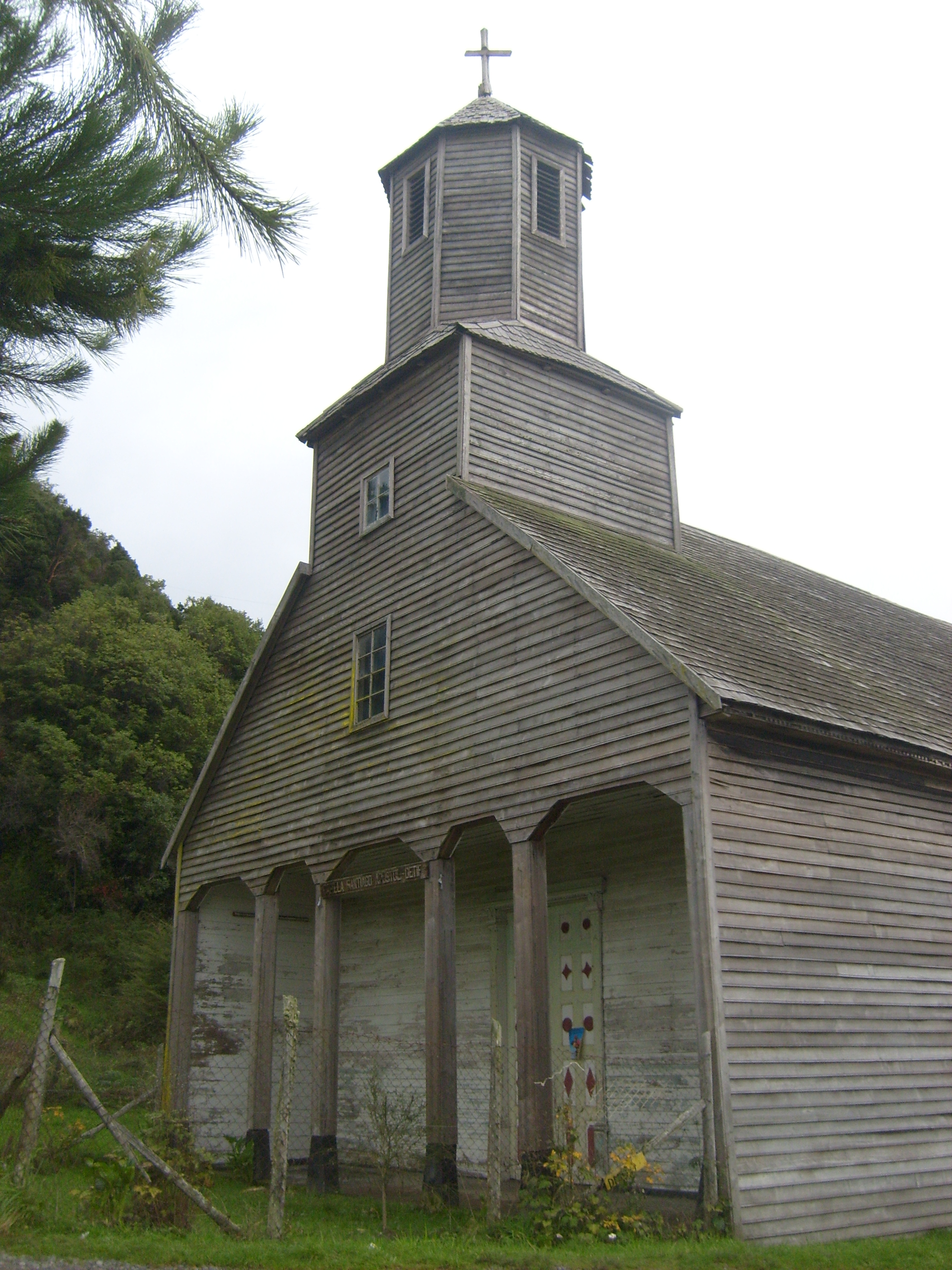 Ubicada en Isla Lemuy This is a photo of a national monument in Chile: 710